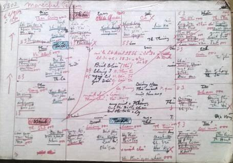 Ph. Pétain2